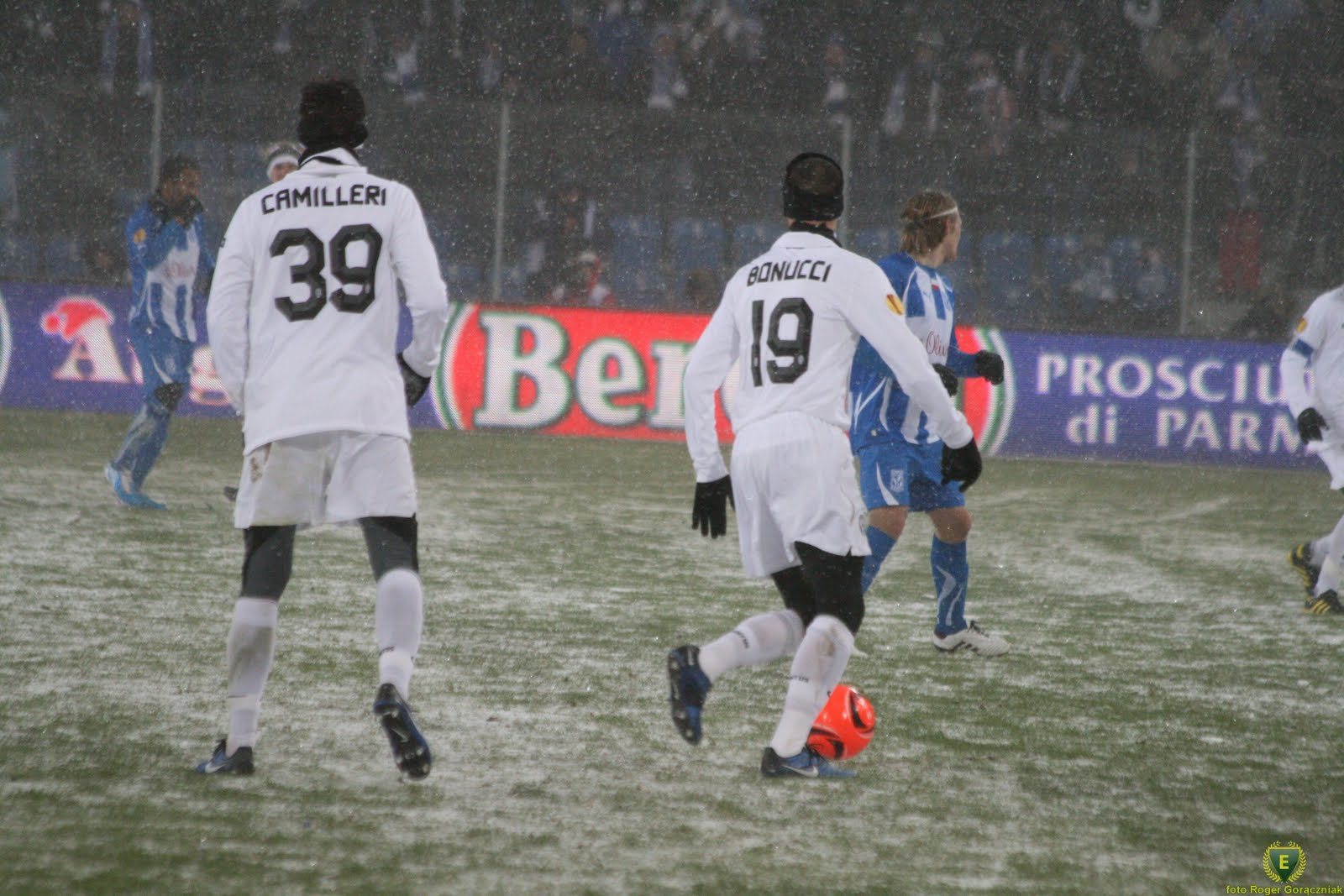 Camilleri insieme a Bonucci.